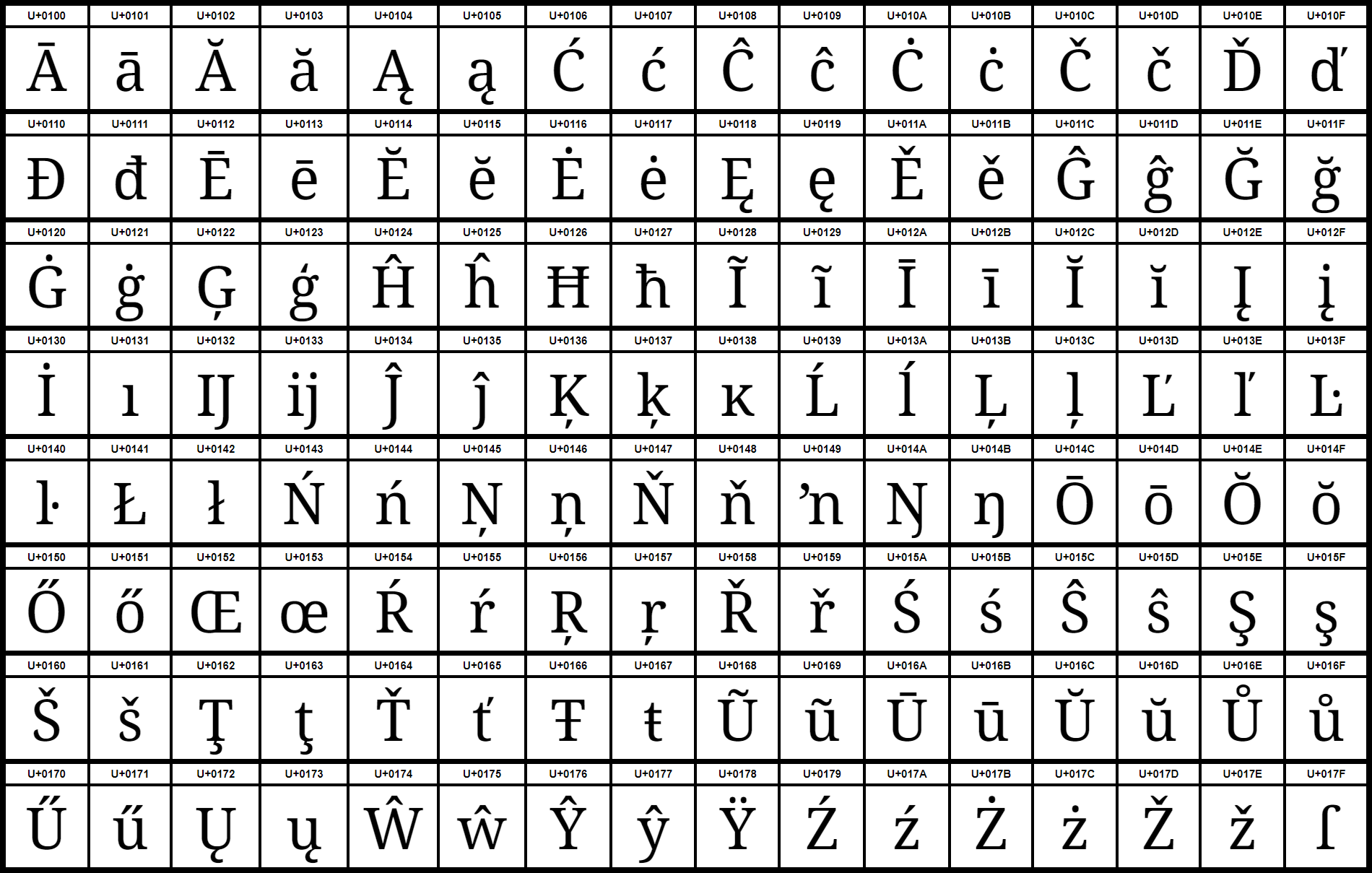 Grafiktafel für den Unicodeblock Lateinisch, erweitert-A.